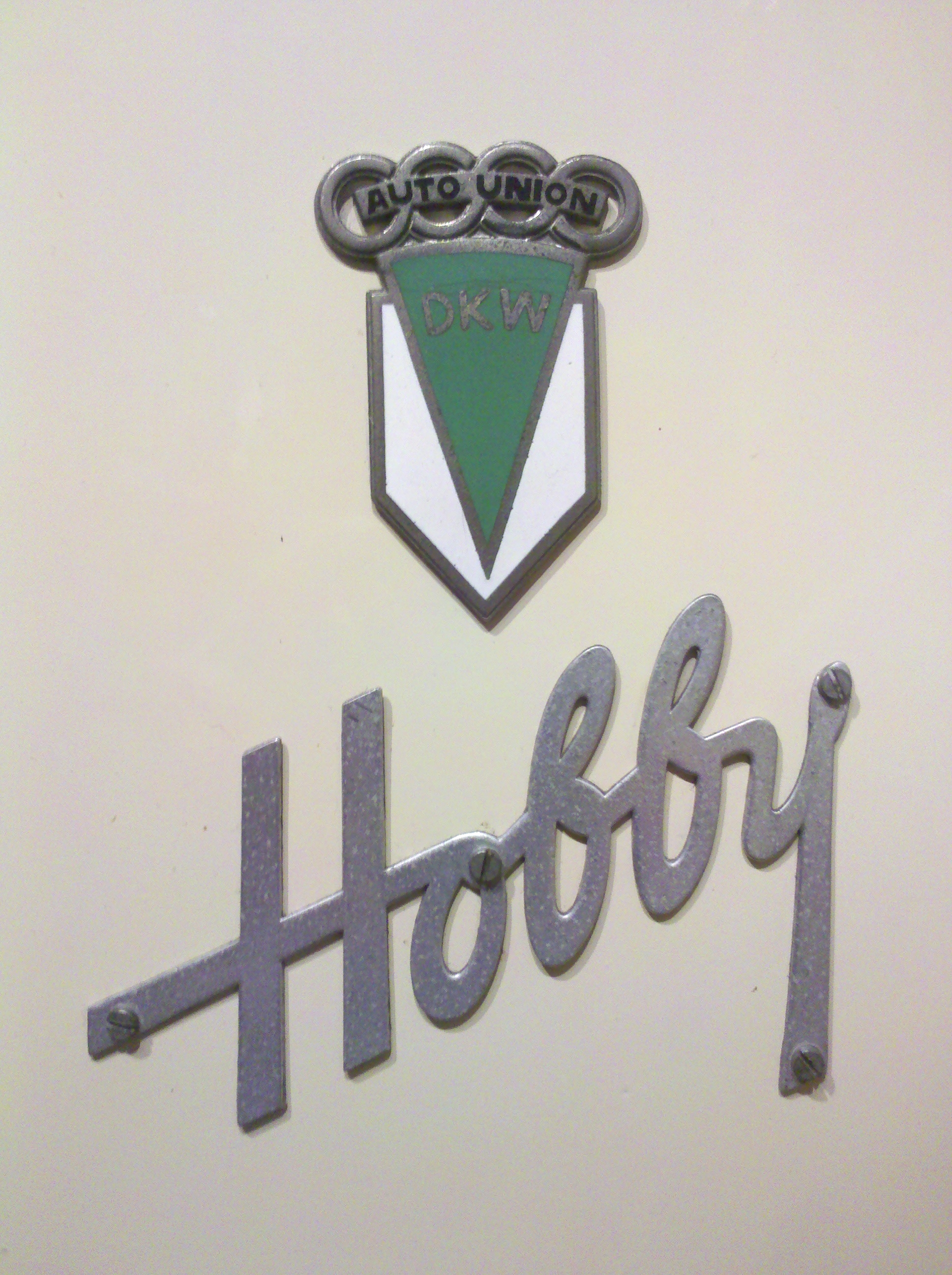 "Auto Union" Firmenemblem und Hobby-Schriftzug am Beinschild einer DKW Hobby Baujahr 1955